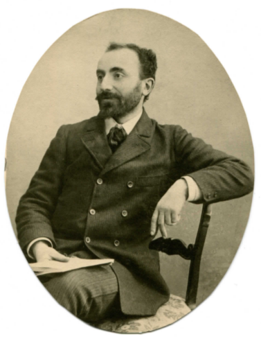 ritratto di Paolo Maranini seduto